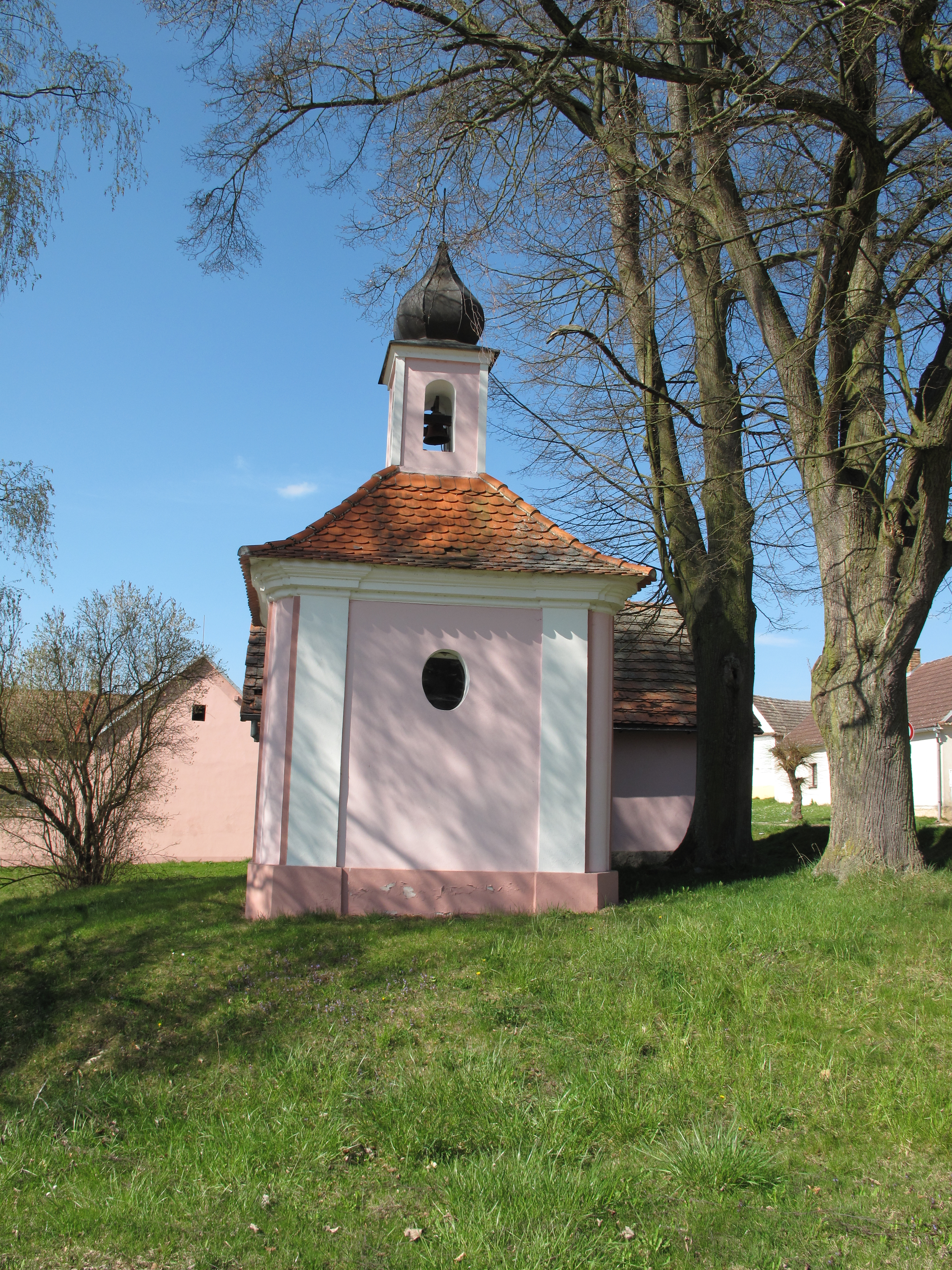 Kaplička v Dobšicích. Okres České Budějovice, Česká republika.